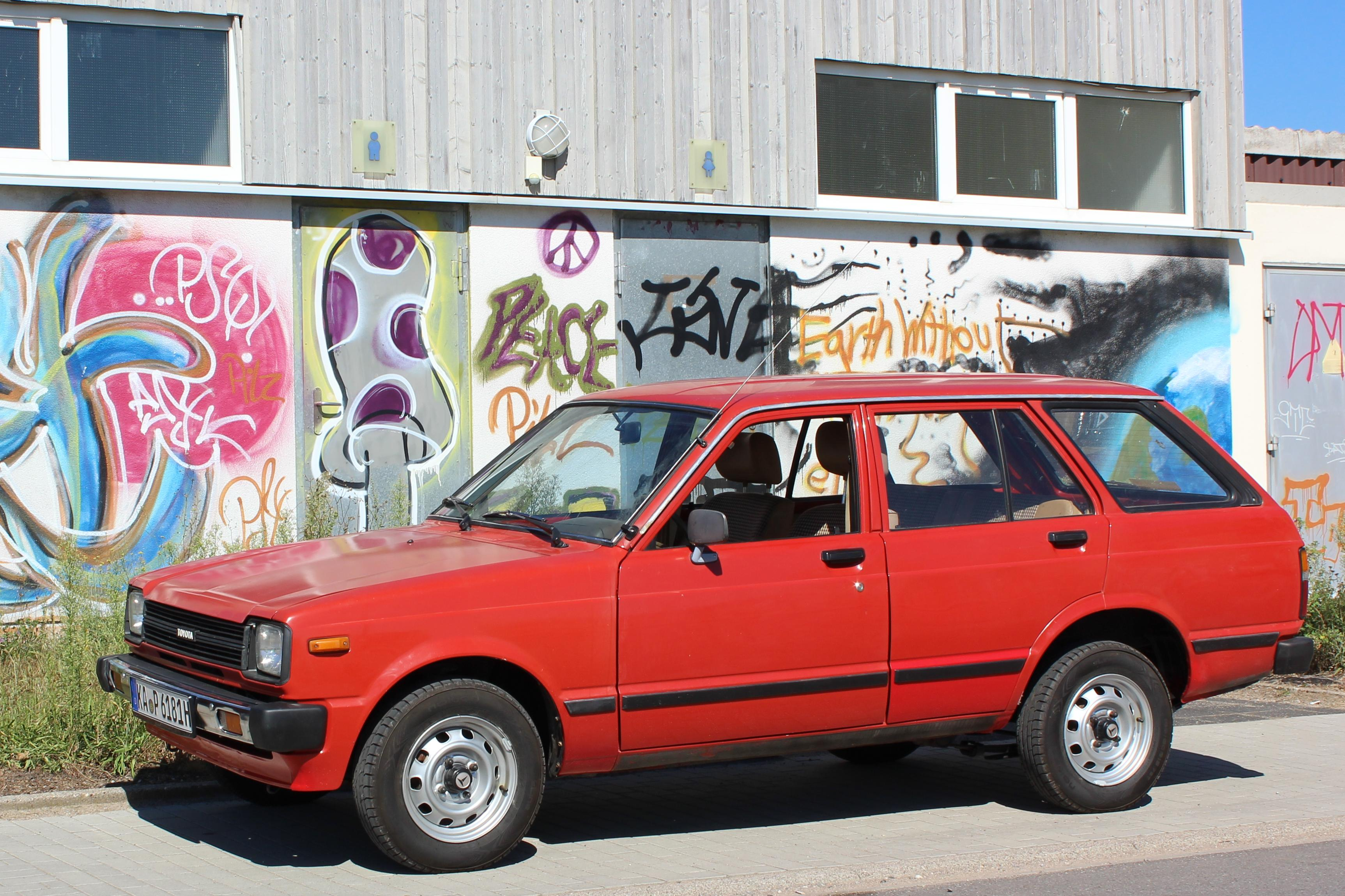 Toyota Starlet KP 61 Kombi